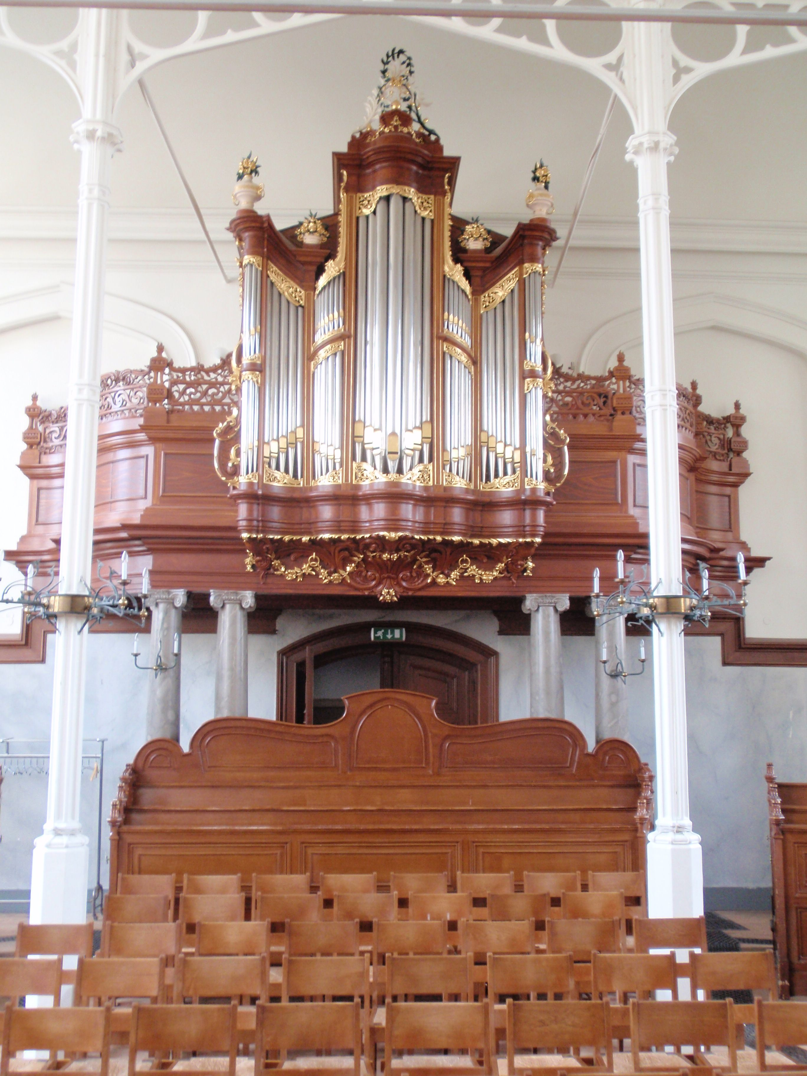 Foto uit Leiden tijdens rijksmonumentendag 2010. Lokhorstkerk.